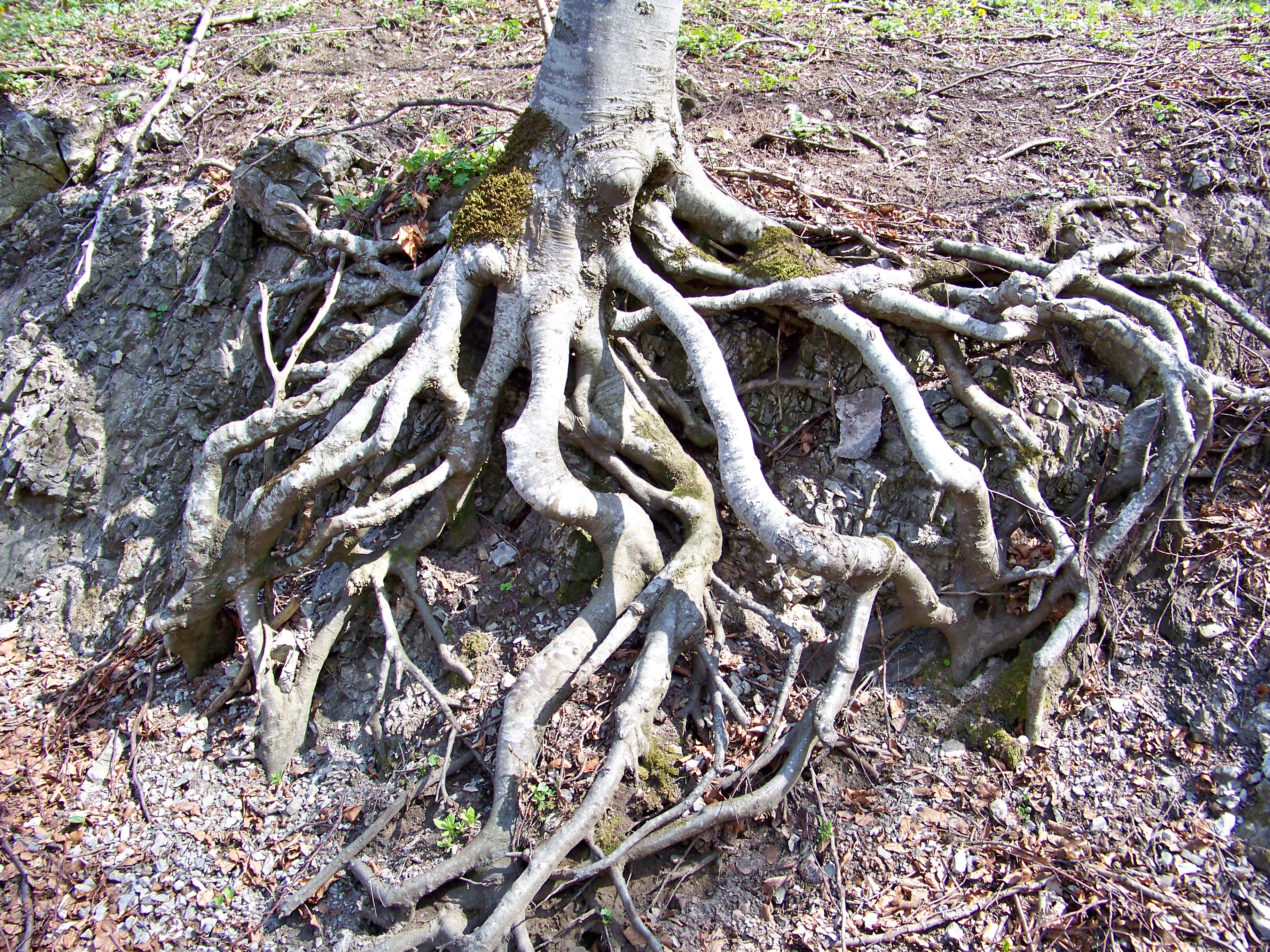 Корен